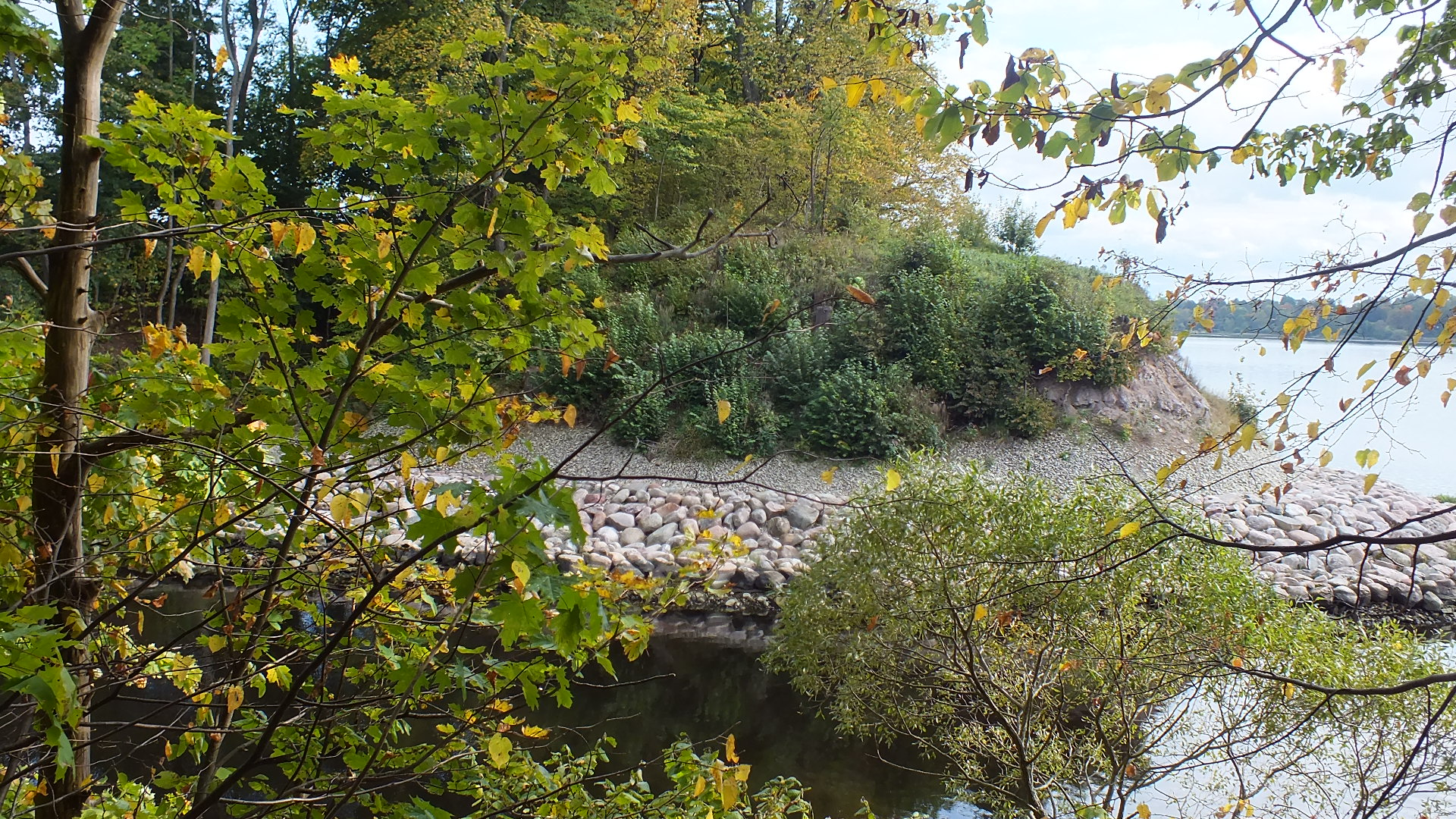 Dieva kalns (Cepures kalns) - pilskalns, Lielvārde